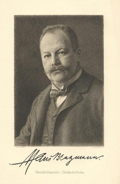 Porträt Hans Benzmann. Radierung von Johann Lindner mit faksimilierter Unterschrift des Porträtierten